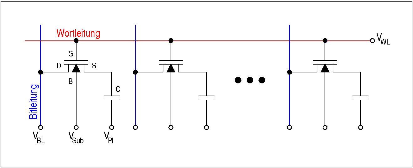 Aufbau einer Speicherseite ("page") aus einzelnen DRAM-Zellen